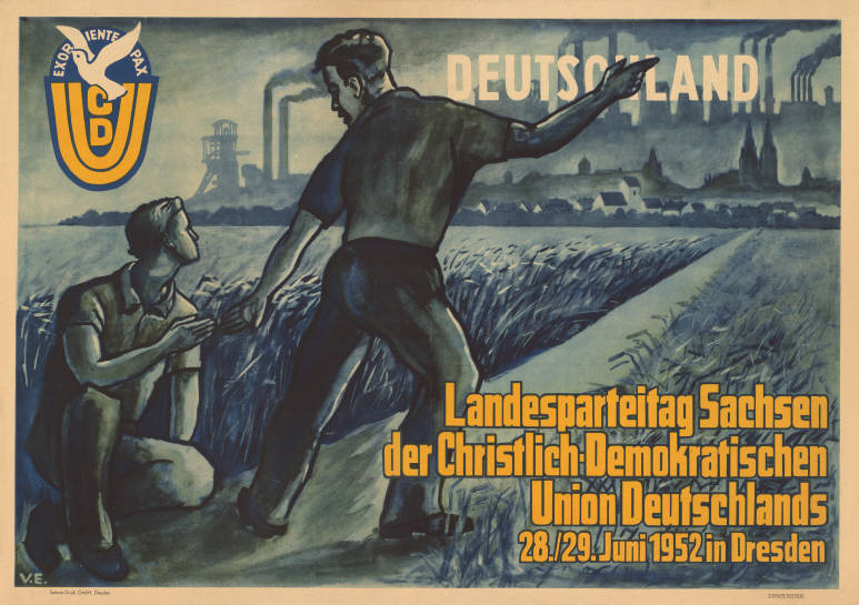 Ex oriente pax CDU Deutschland Landesparteitag Sachsen der Christlich-Demokratischen Union Deutschlands 28./29. Juni in Dresden Abbildung: ParteilLogo - Zwei Junge Männer auf dem Weg durch eine Agrarlandschaft in eine durch rauchende Schornsteine und Fördertürme industriell geprägte Stadt (Grafik) Plakatart: Ankündigungsplakat Künstler_Grafiker: V.E. Drucker_Druckart_Druckort: Selecta-Druck GmbH, Dresden 232625/52/1500 Objekt-Signatur: 10-024 : 3048 Bestand: Plakate aus der SBZ/DDR (10-024) GliederungBestand10-18: Ost-CDU / CDUD / Exil-CDU Lizenz: KAS/ACDP 10-024 : 3048 CC-BY-SA 3.0 DE